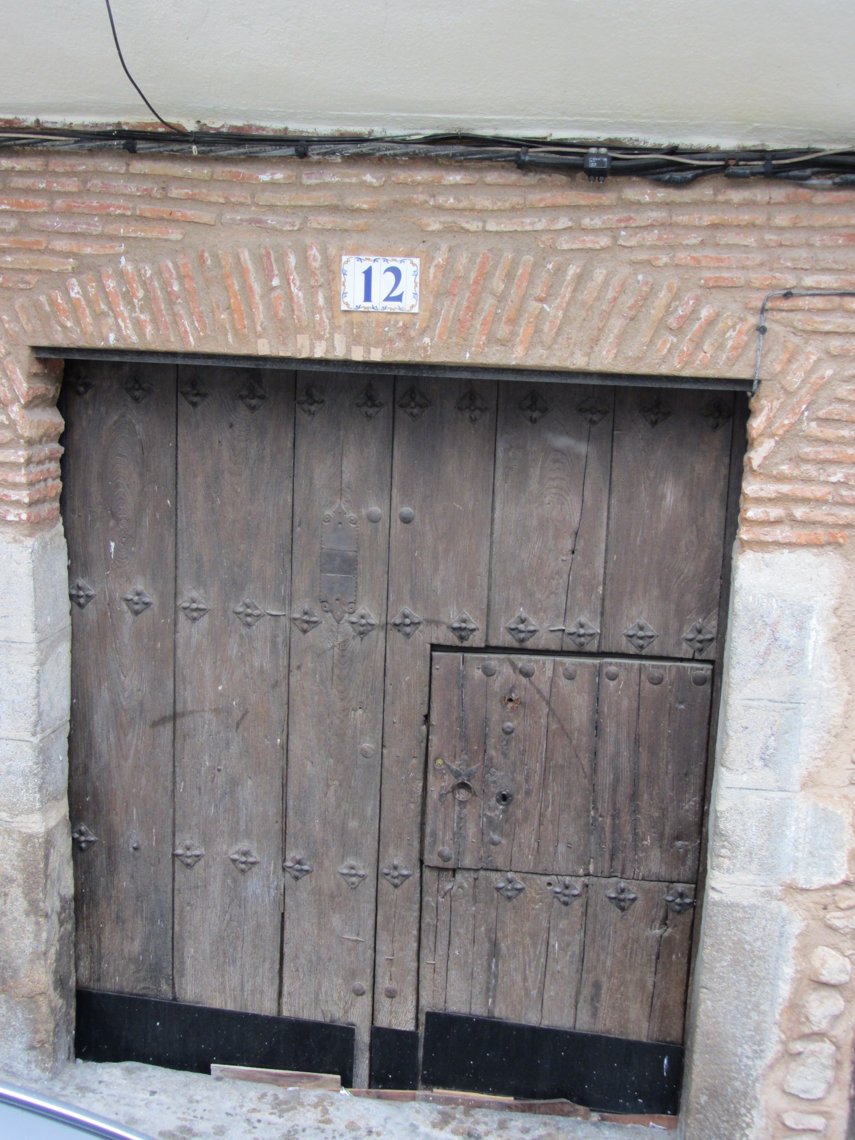 Atari tipikoa (zurezko atea).